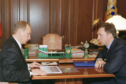 МОСКВА, КРЕМЛЬ. С генеральным директором ОАО «Русский алюминий» Олегом Дерипаской.